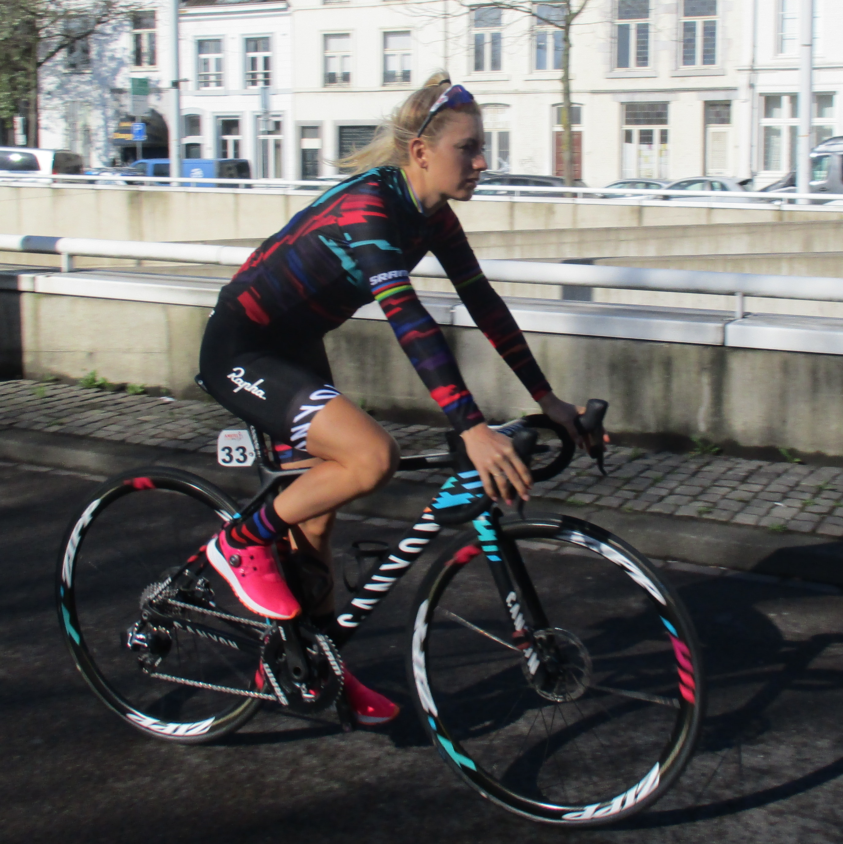 Start van de Amstel Gold Race Ladies Edition 2018 in Maastricht.